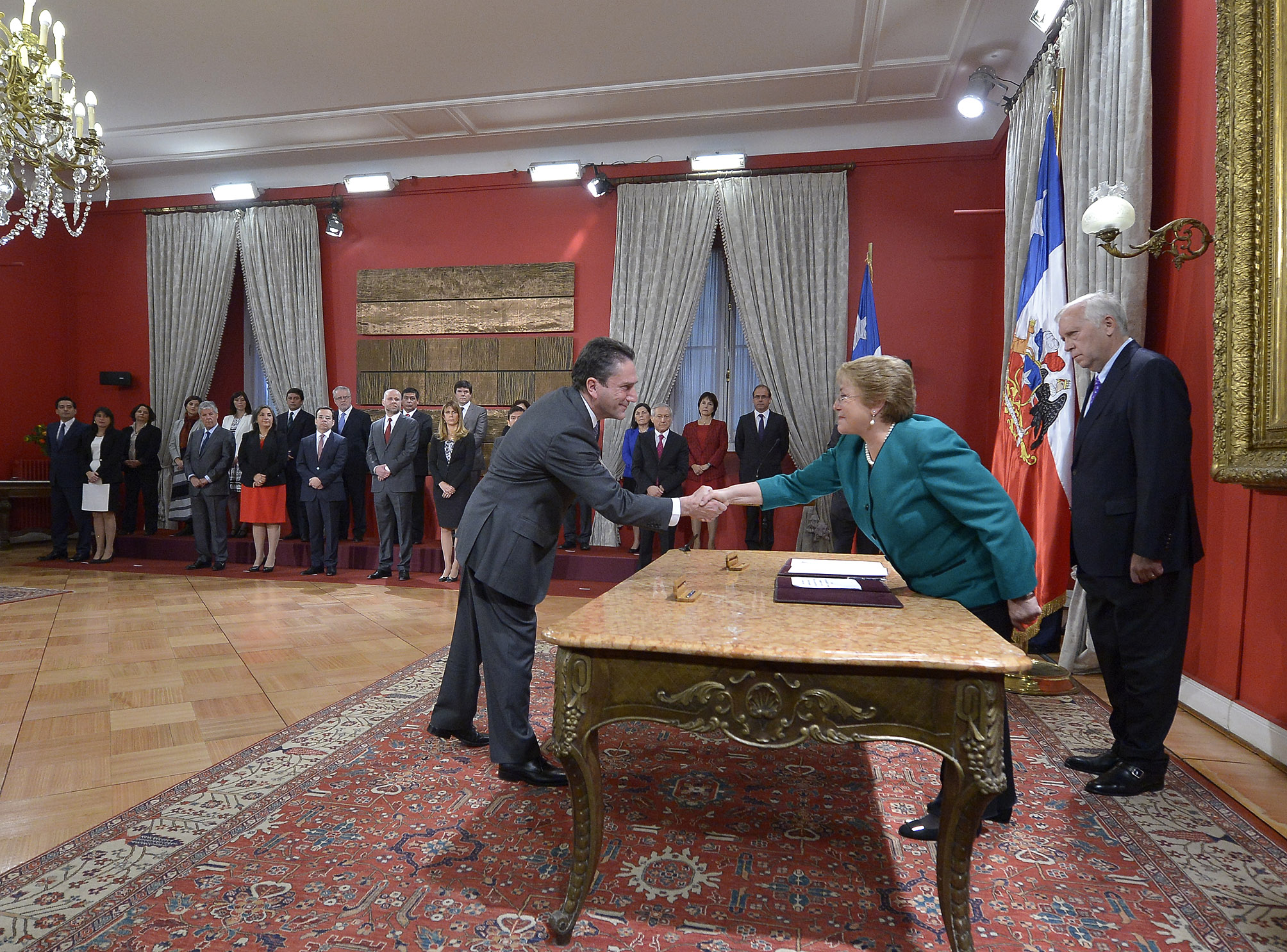 11/05/15 Cambio de Gabinete, Asume Ministro Marcelo Diaz.